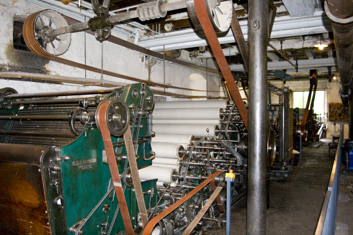 Dreikrempelsatz (Kardiermaschine) in der Tuchfabrik Müller, Euskirchen-Kuchenheim